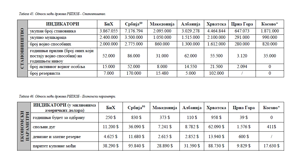 Становништво; Економски параметри